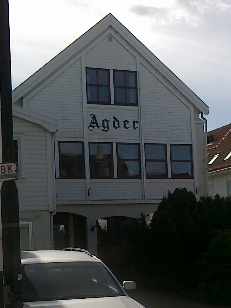 Agder newspaper headquarters, Flekkefjord, Norway.